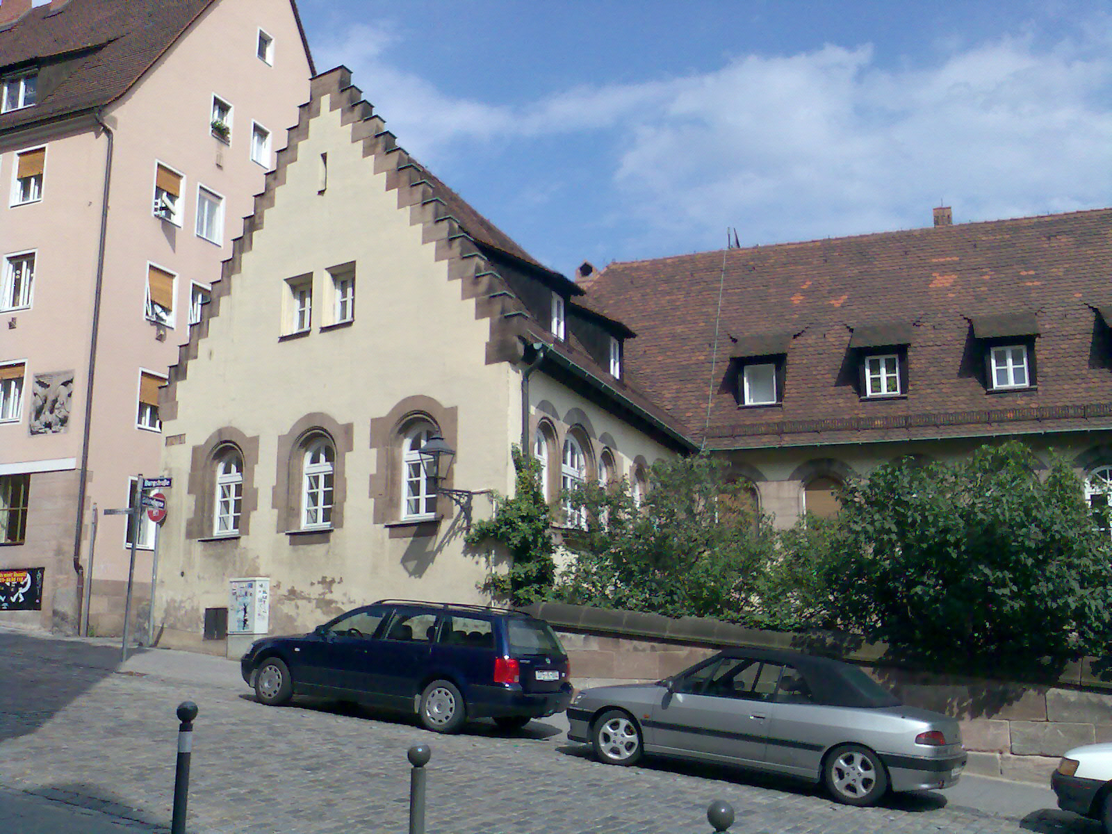 Gebäudeteile des ehemaligen Dominikanerklosters Nürnberg